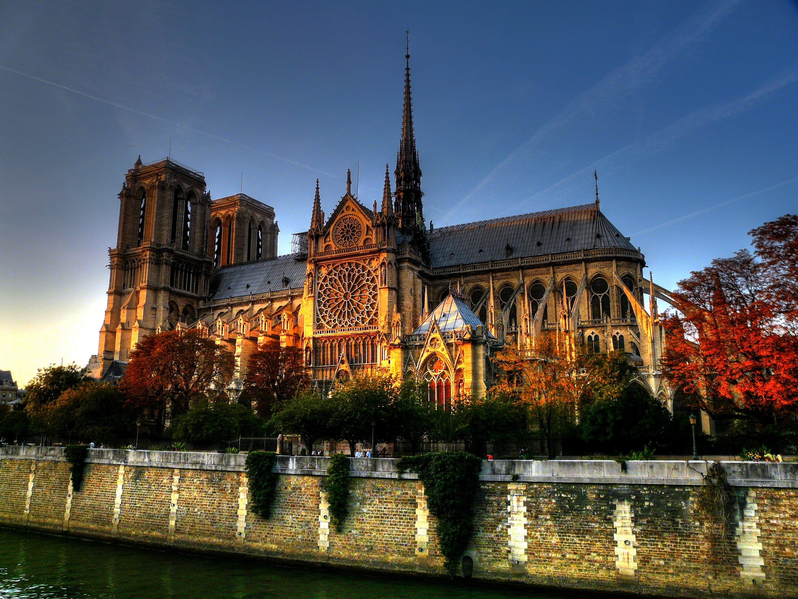 Le transept sud de la cathédrale Notre-Dame de Paris au-dessus du square Jean XXIII, Paris, France.